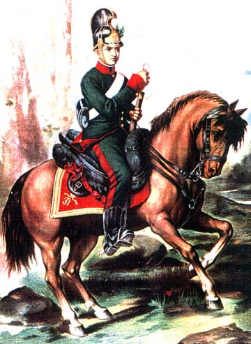 Chevauxleger des österreichischen Chevauxleger Regiments No. 4, ca. 1820